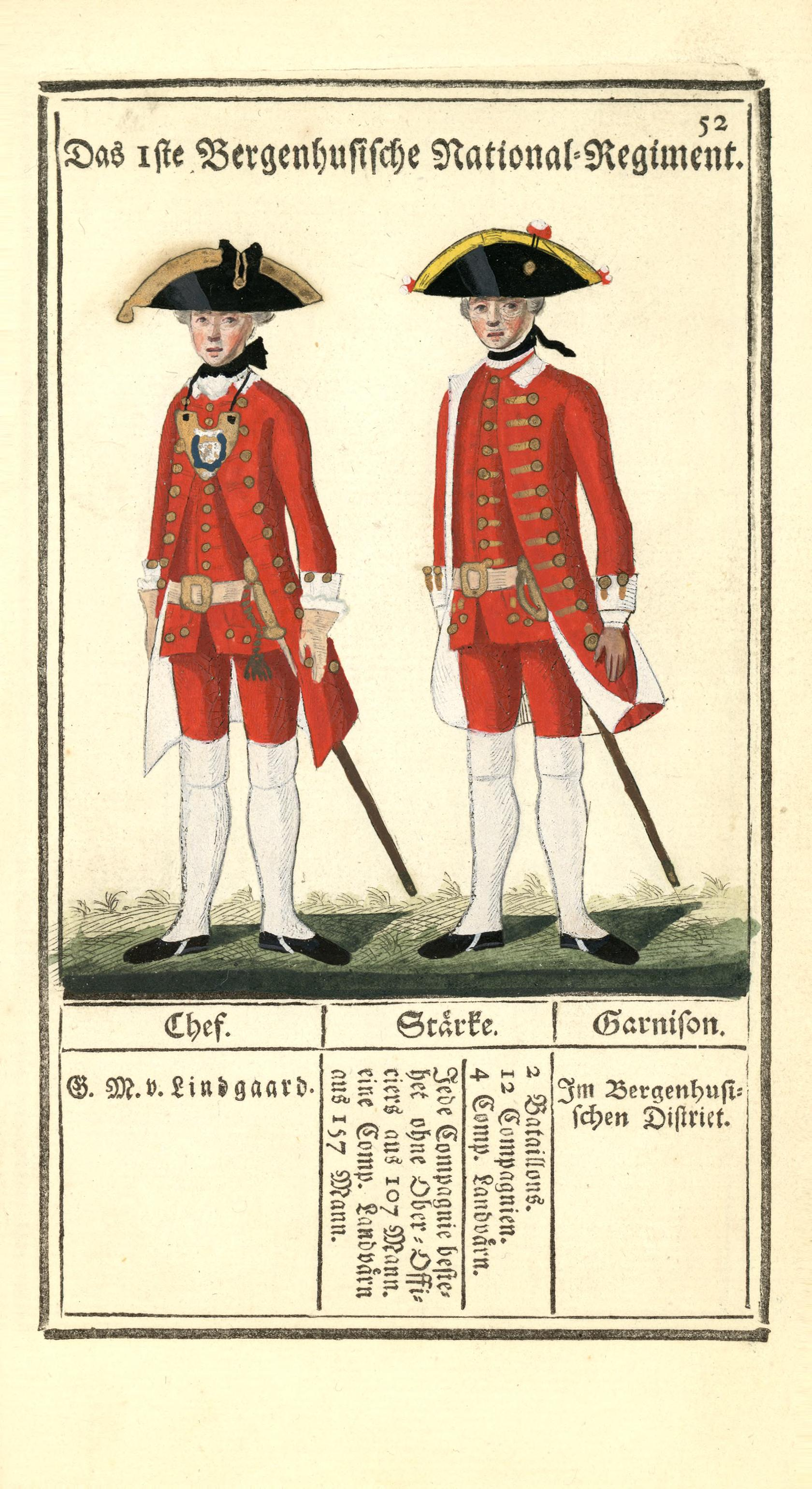 Illustrasjon hentet fra boken "Vorstellung der sämtlichen Königl. Dänischen Armee" av Bertram, Carl og utgitt av Carl Bertram (dk, 1763)